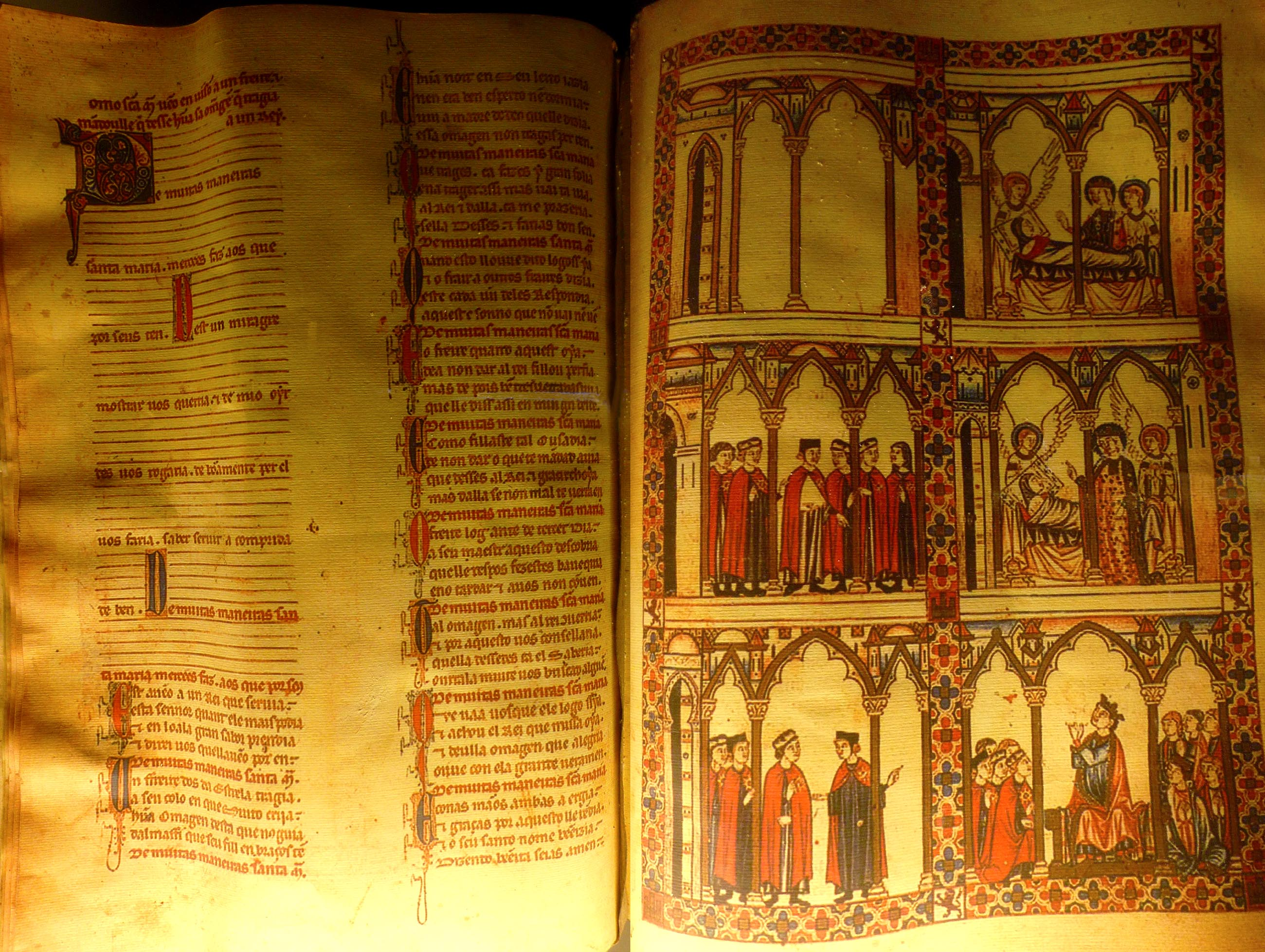 Cantiga de Santa María número 78 del Códice de Florencia con la creación de la orden de Santa María de España o Santa María de la Estrella. Facsímil expuesto en el Castillo de la Concepción de Cartagena.